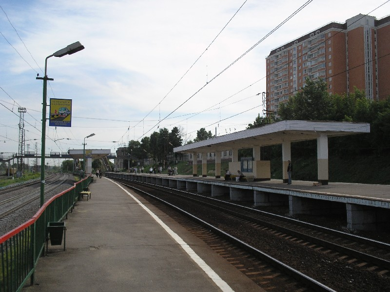 Krasny Stroitel Красный Строитель.== Permission ==